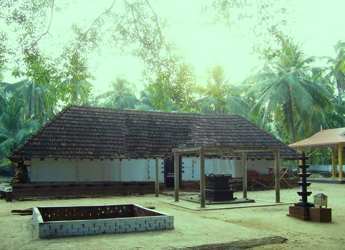 പേരകം ശിവക്ഷേത്രം